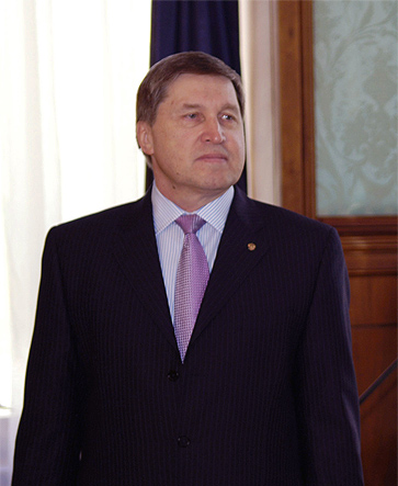 Посол России в Соединенных Штатах Юрий Ушаков.